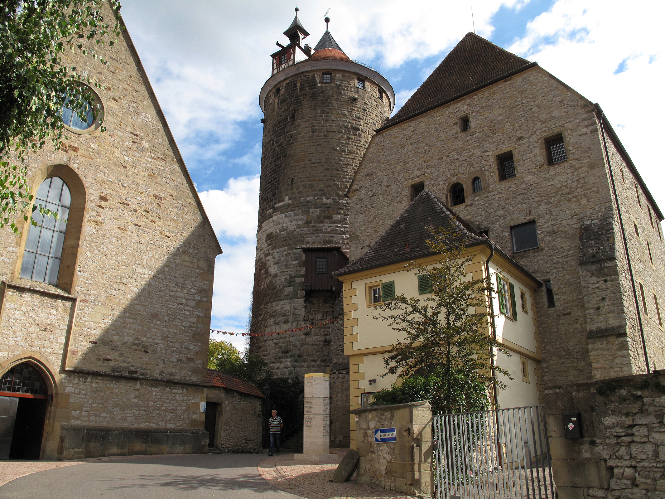 Stadtkirche, Burgturm und Stauferstele - Besigheimer Skulpturenpfad, Deutschland, Baden-Württemberg, Besigheim